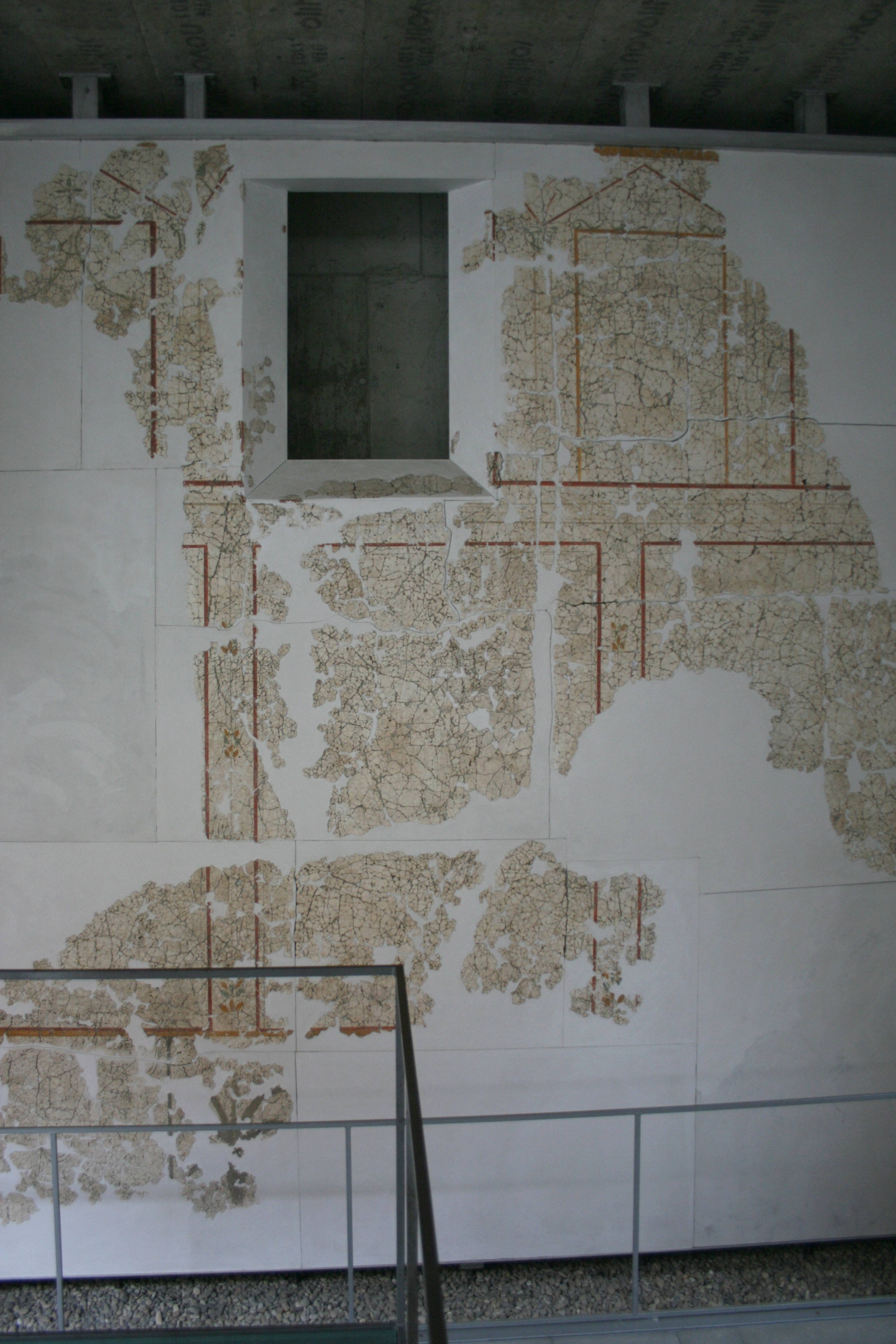 Römischer Wandverputz aus dem praetorium des Kastell I in Ladenburg. Ausstellung am Fundort.